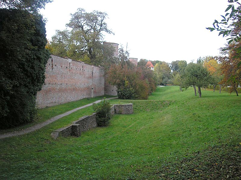 Landsberg am Lech (Oberbayern). Nordöstlicher Mauerzug der Stadtbefestigung. Eigene Aufnahme, Okt. 2006 / Landsberg am Lech (Upper Bavaria, Germany). City wall, looking northeast. Own photo, Oct. 2006